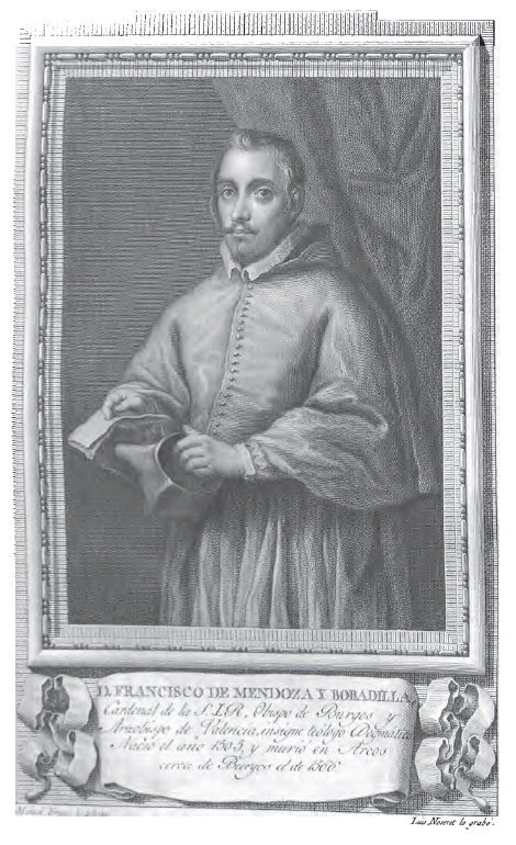 Retrato del cardenal español Francisco de Mendoza y Bobadilla (1508-1566), que llegó a ser obispo de Coria y Burgos y cardinal de la Iglesia Católica.